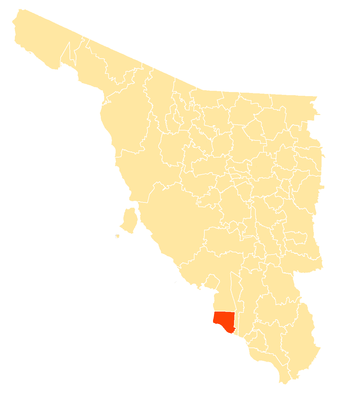 Municipio de Sonora, México.